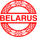 Эмблема на автомобильном номере Республики Беларусь 1996 г.